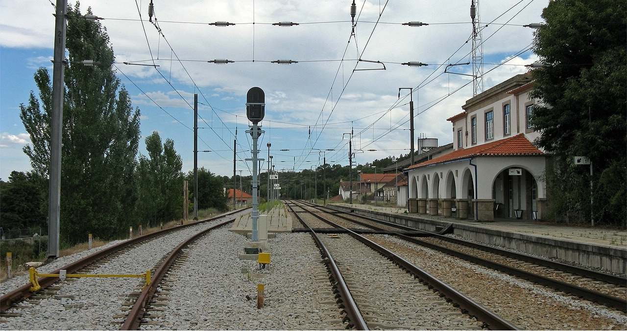 4 / Agosto / 2009